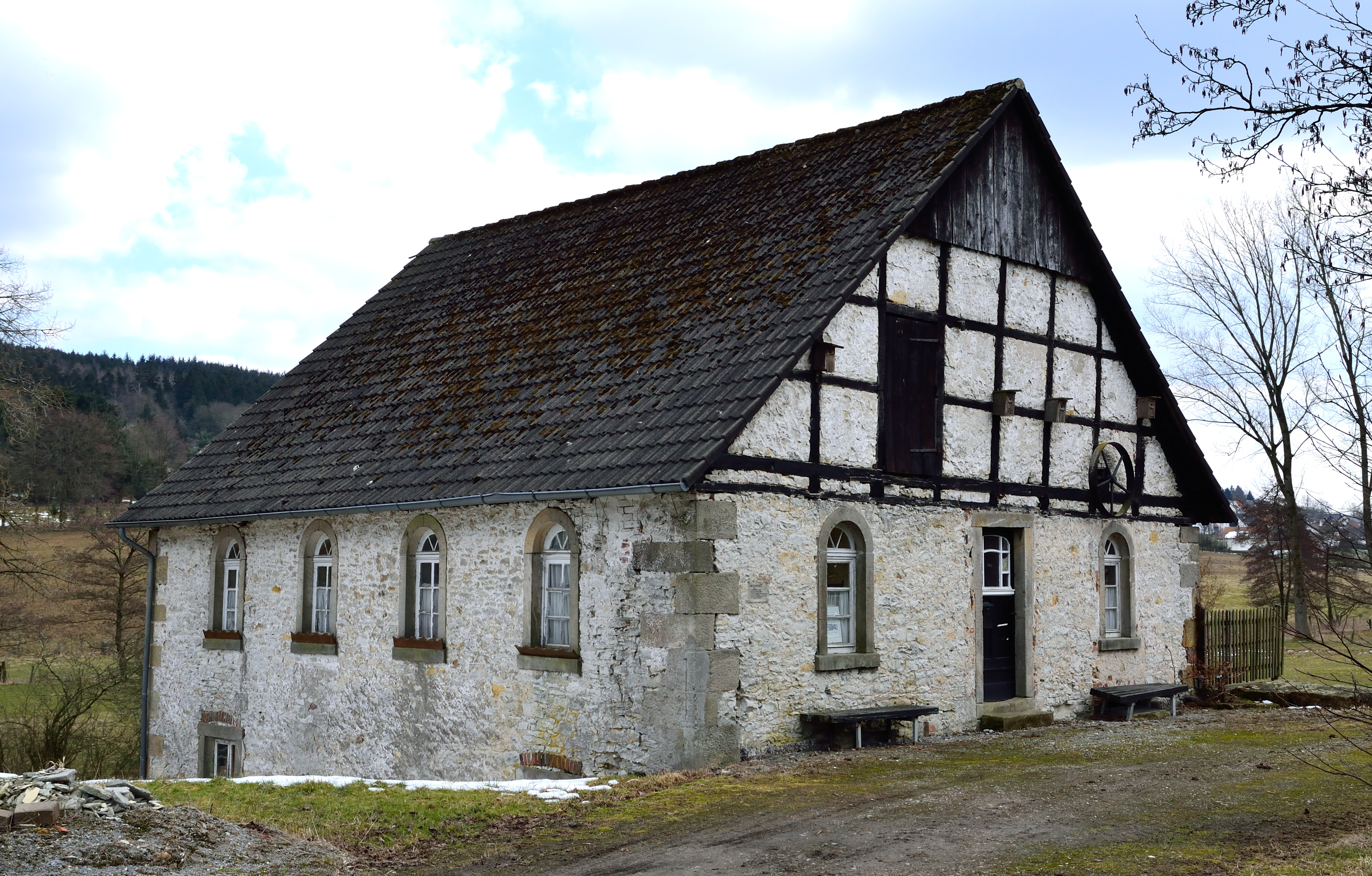 This is a photograph of an architectural monument. .1 ehemalige Bollmühle in Veldrom